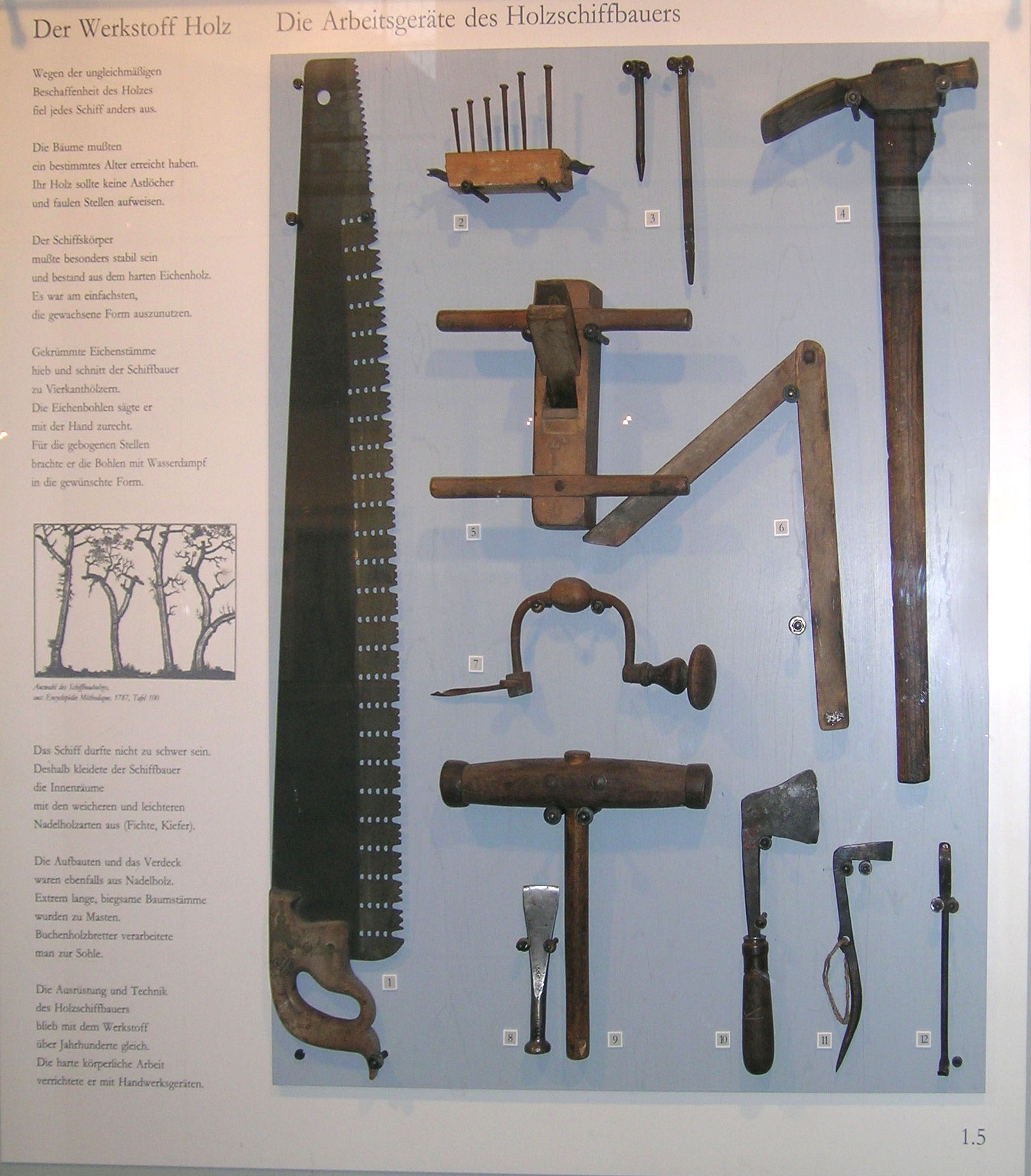 Schifffahrts- und Schiffbaumuseum Wörth am Main (Arbeitsgeräte des Holzschiffbauers)